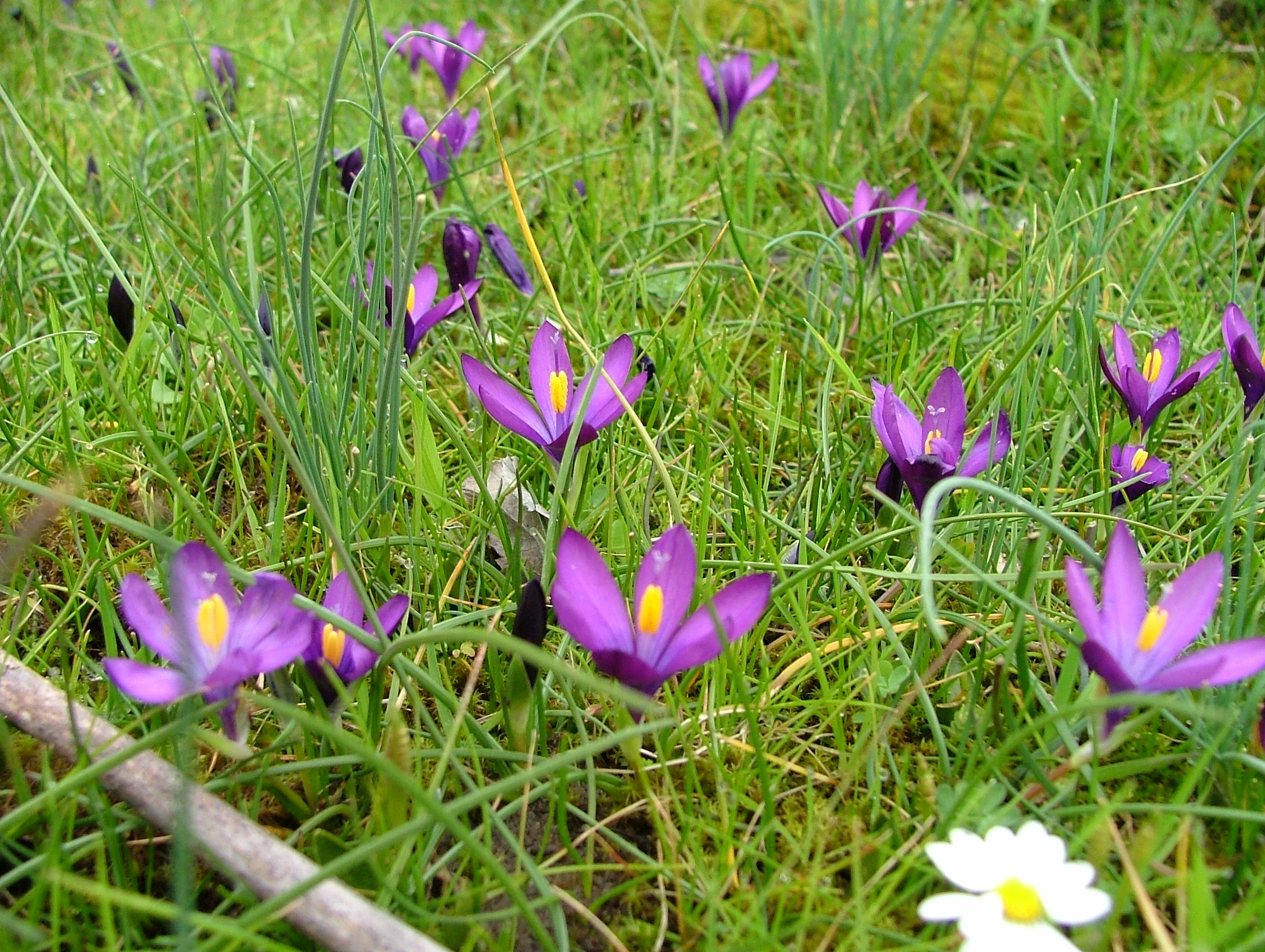 Prato di Romulea requienii Parl.